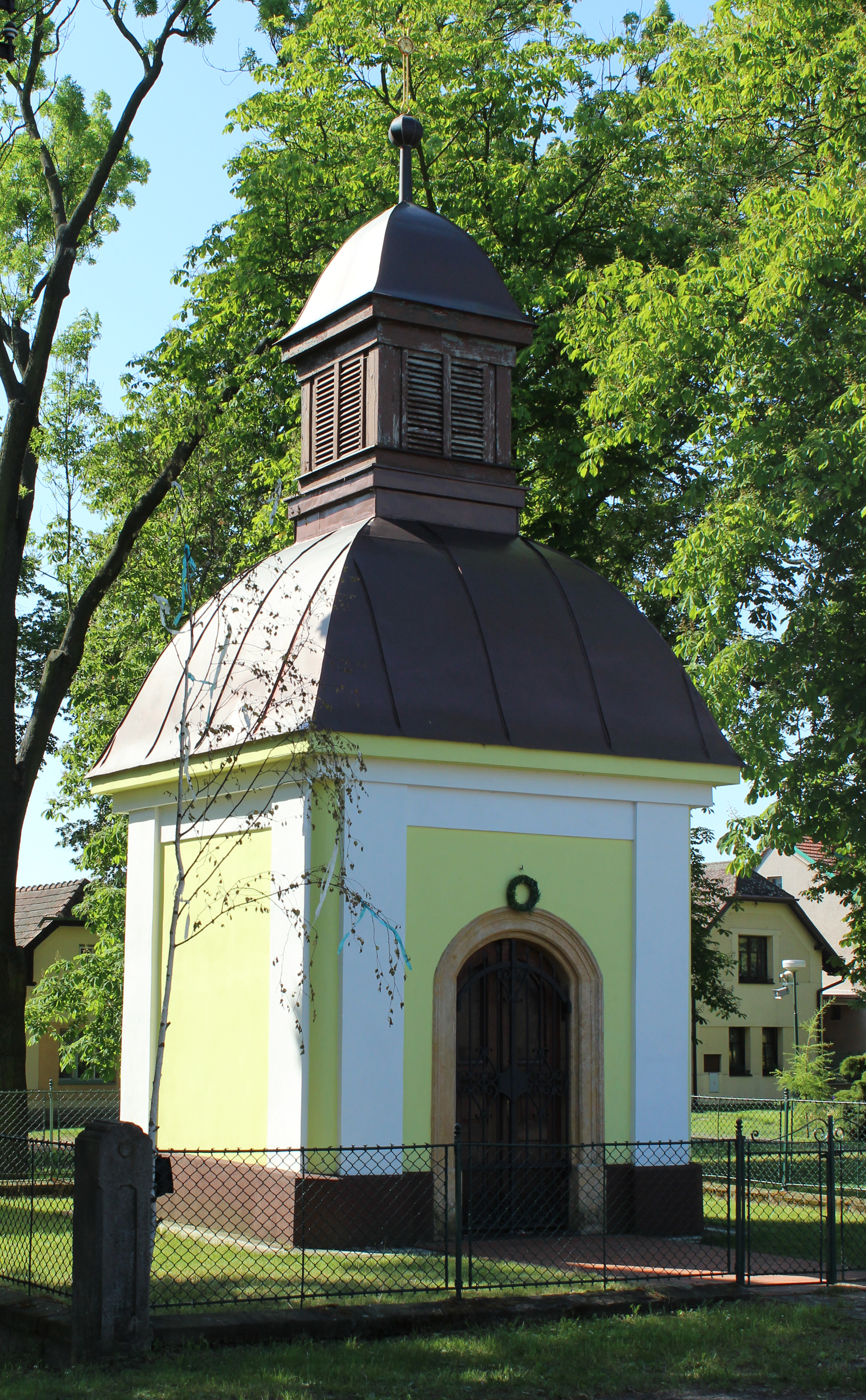 Straky; kaplička. Project: Fotíme Česko.